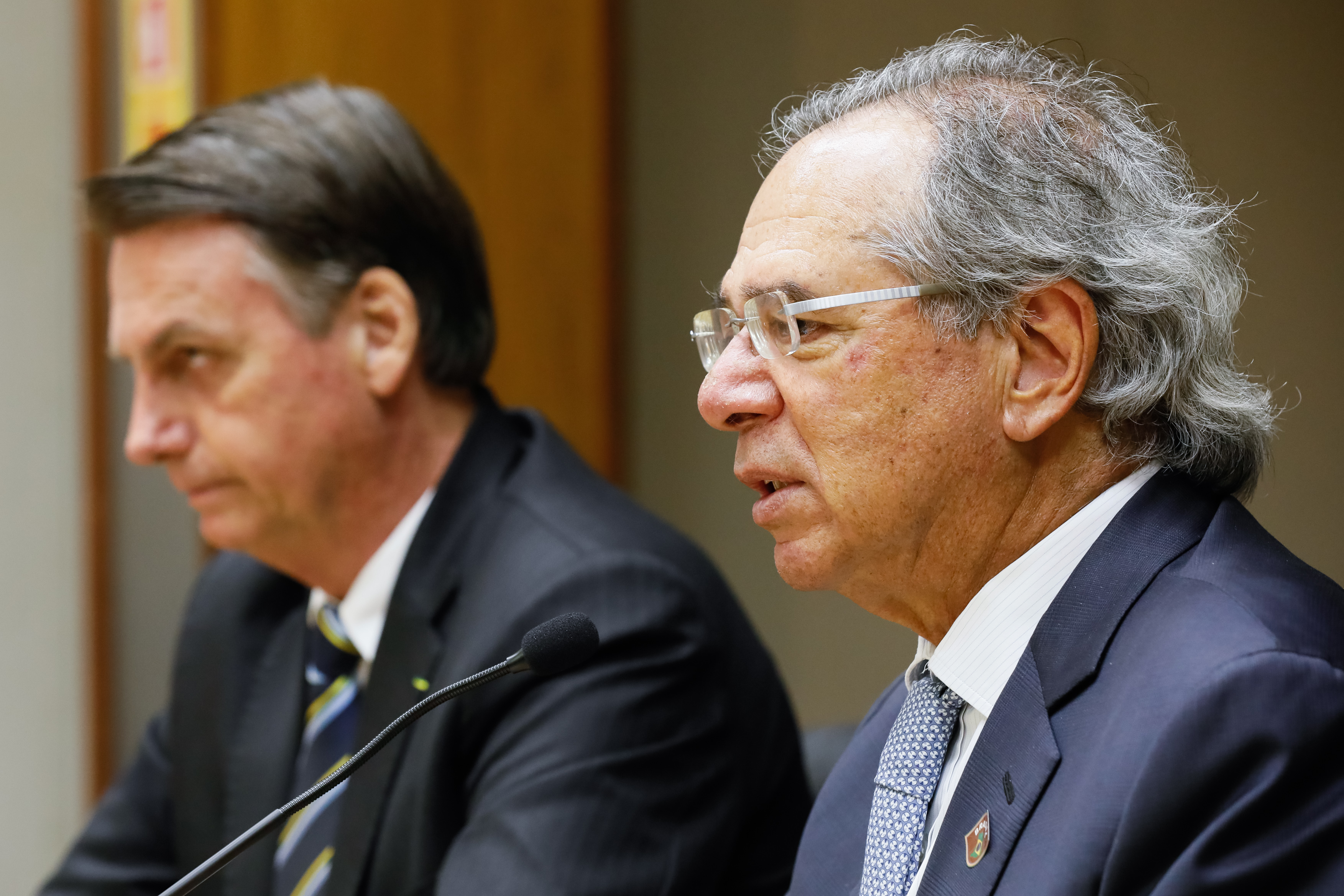 (Brasília-DF, 06/05/2019) Presidente da República, Jair Bolsonaro durante reunião com o Ministro da Economia, Paulo Guedes. Foto: Isac Nóbrega/PR